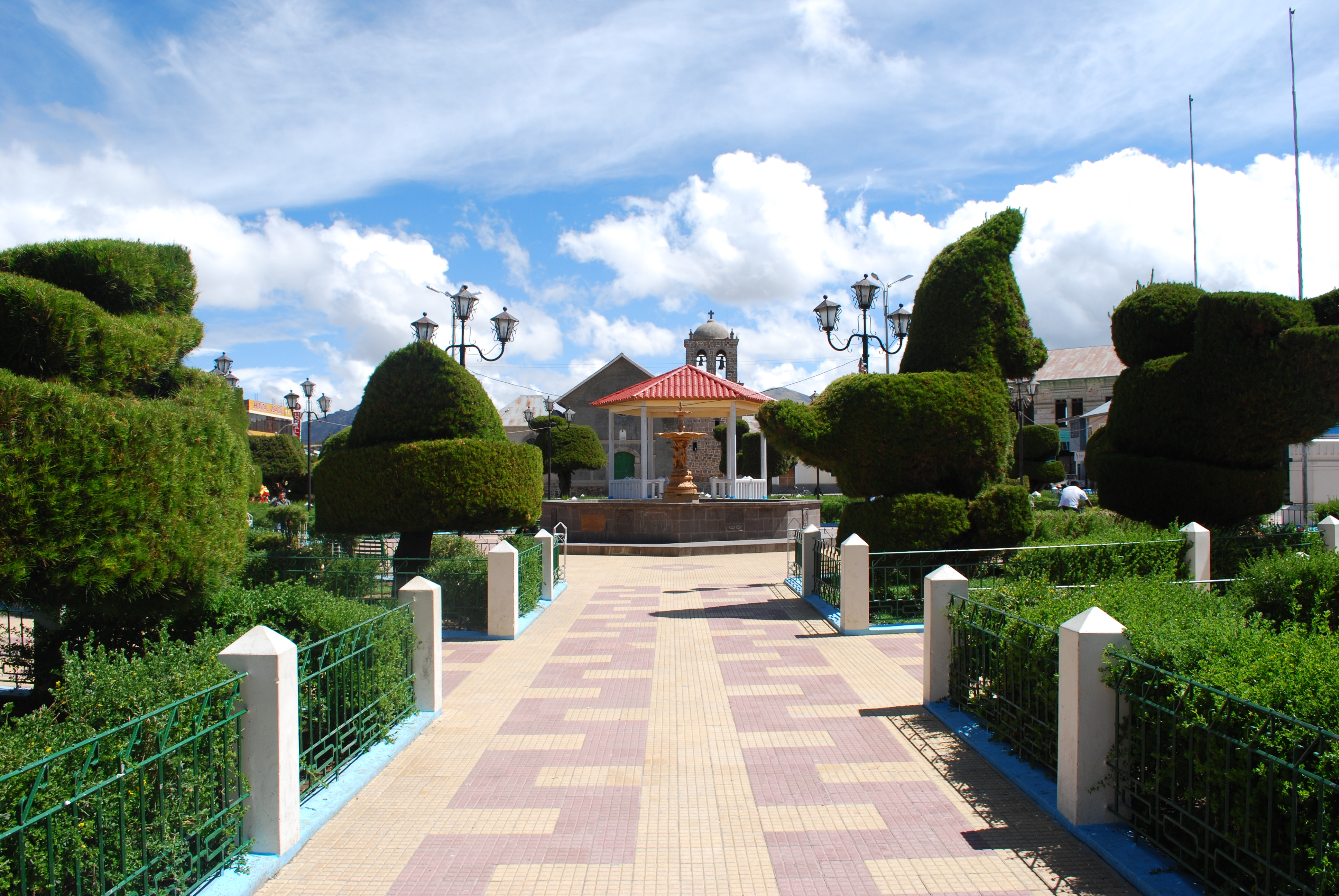 Yunguyo plaza in Peru